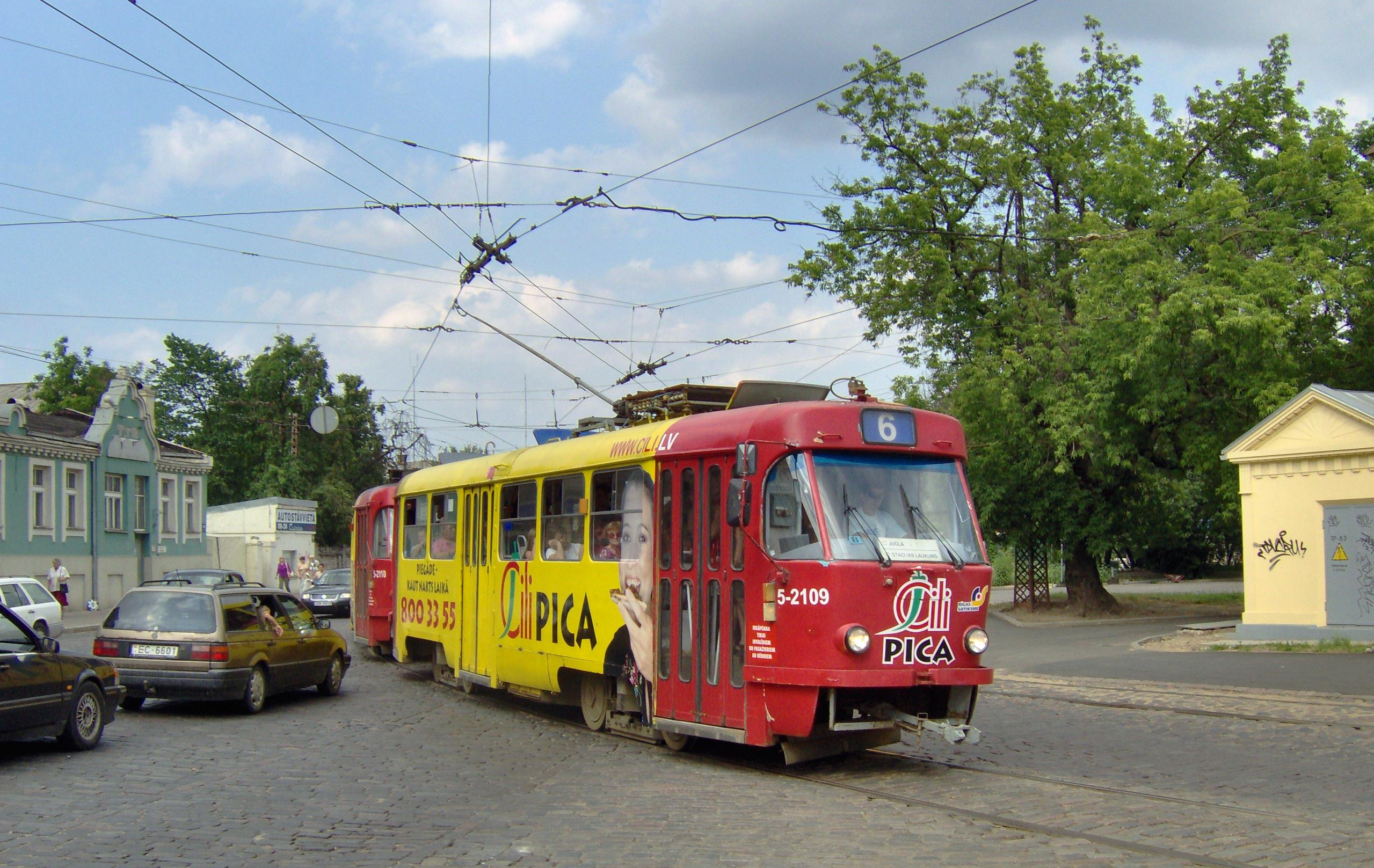 Tramvaj T3 č. 5-2109 linky 6 odbočuje z třídy Brīvības na ulici Krišjāņa Barona